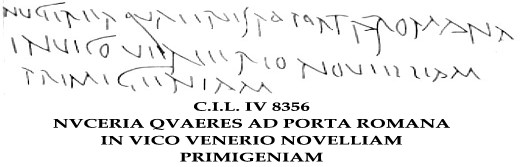 Inscripción pompeyana. Corpus Inscriptionum Latinarum 4, 8356 (CIL IV, 8356 - Latium et Campania / Regio I): Nucer(i) quaeres ad porta(m) Romana(m) / in vico Venerio Novelliam / Primigeniam = (Nuceriae quaeres ad portam Romanam in vico Venerio Novelliam Primigeniam)